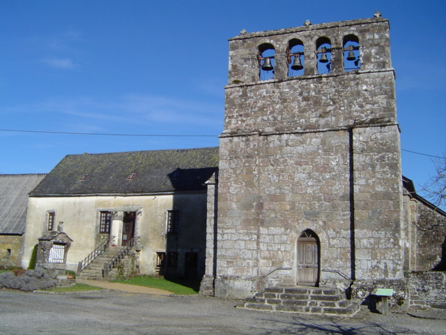 Eglise et presbytère du village. La particularité de l'église est de posséder 4 cloches à son clocher.